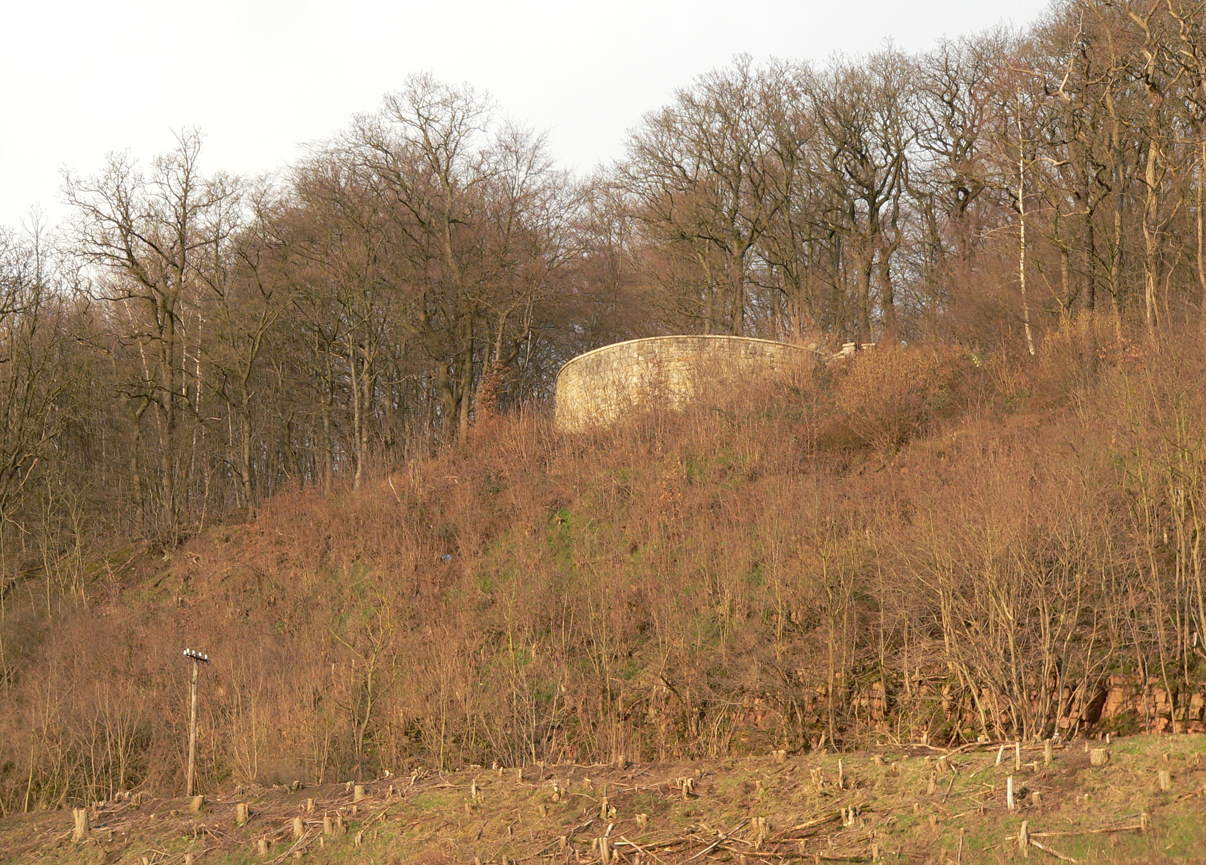 Weserliedanlage vom Tanzwerder gesehen